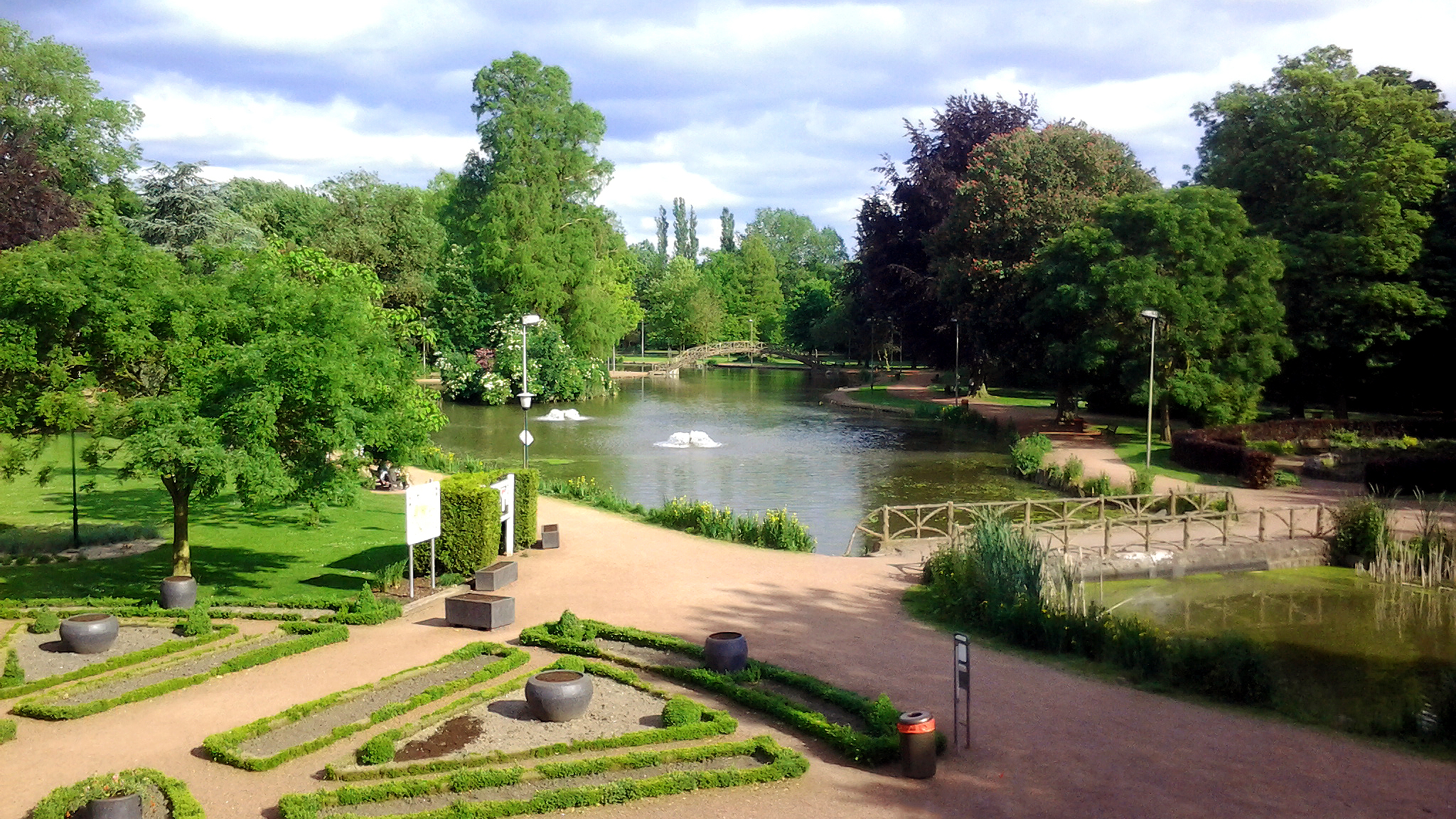 vue du parc de Jemappes depuis le château Guillochain